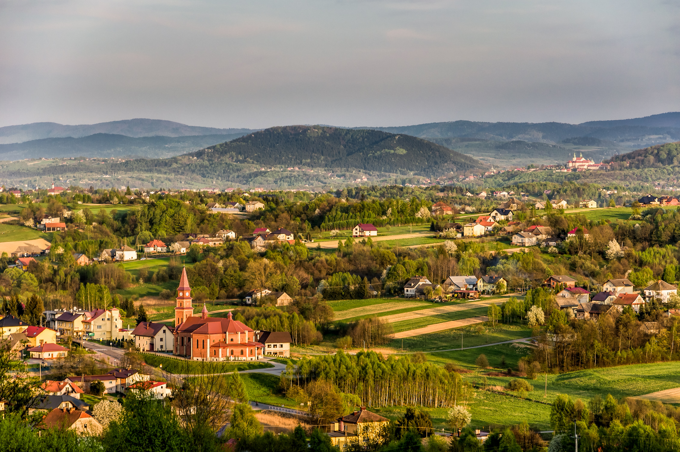 Widok na centrum Wysokiej